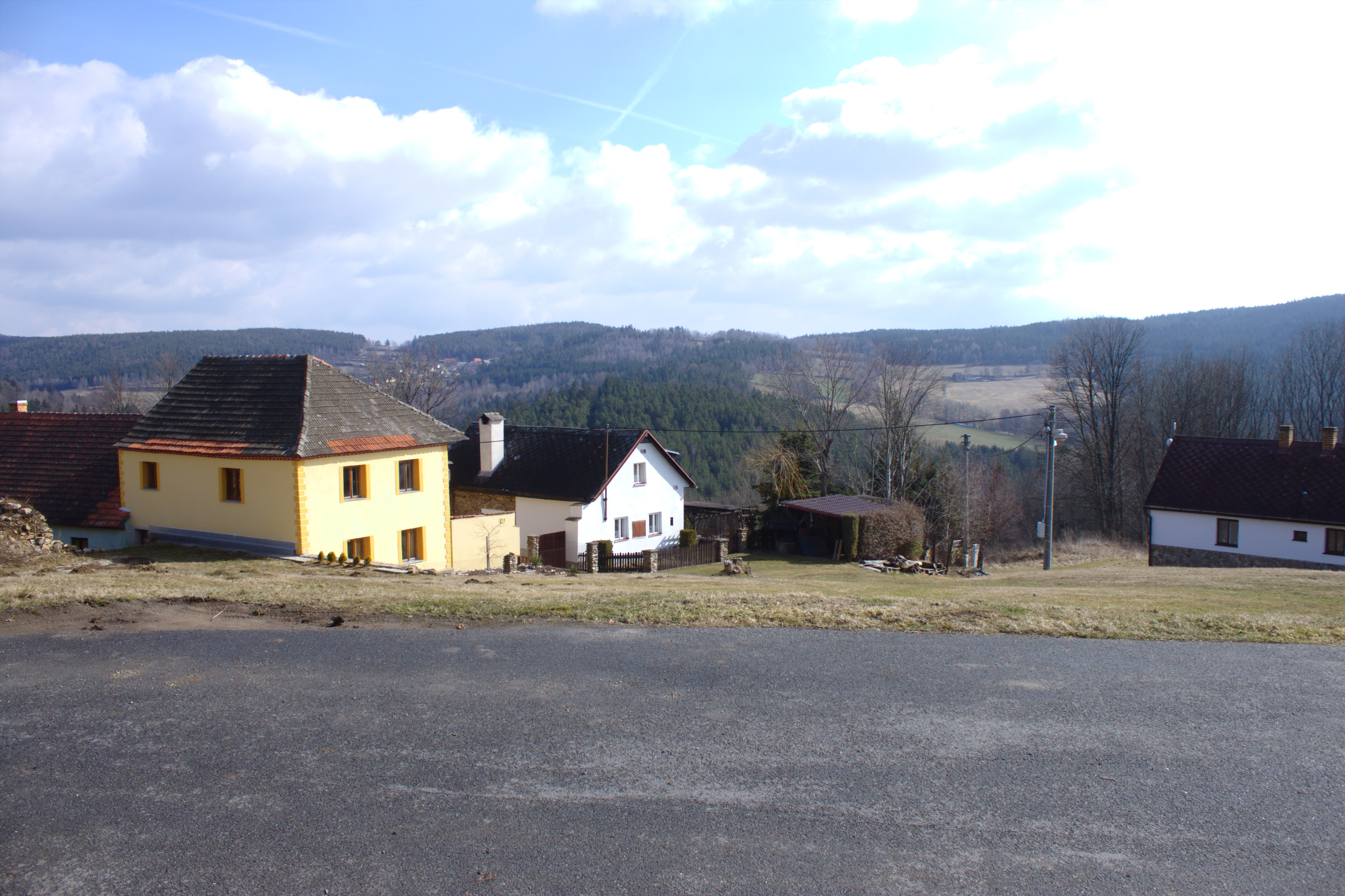 Domy na návsi ve vesnici Lazišťka Project: Fotíme Česko